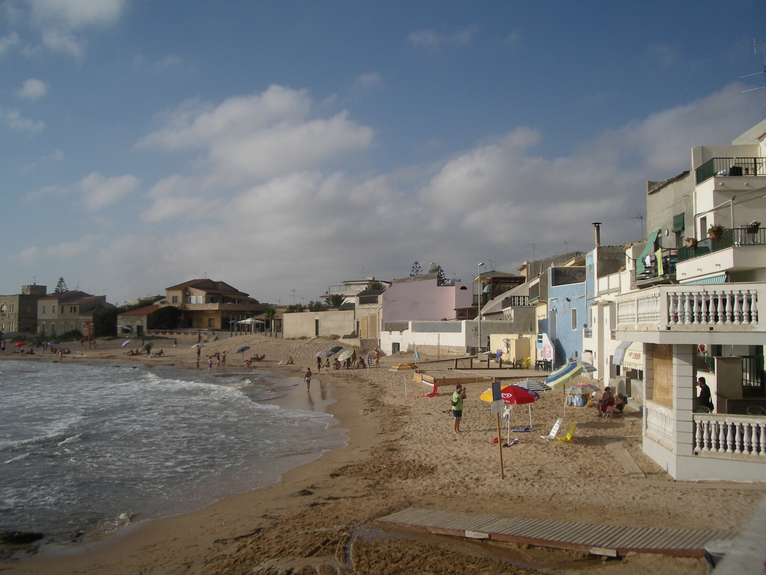 punta secca e casa di Montalbano